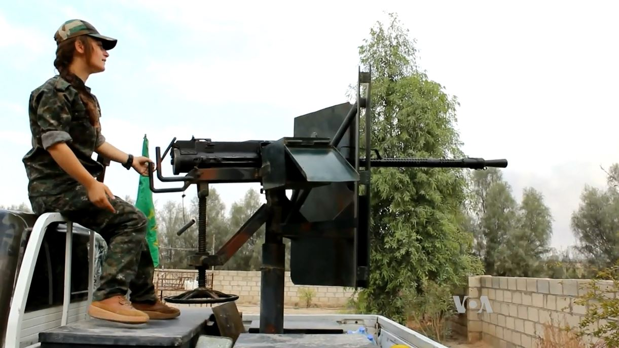 Membres des YPG à la bataille de al-Hol en Syrie en 2015